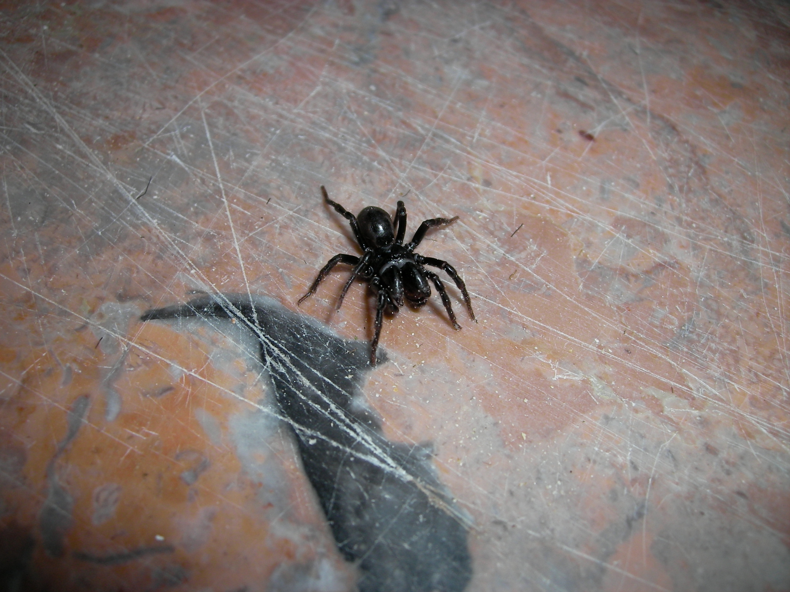 Atypus affinis, Wohnungsfund aus Freudenberg (Postleitzahl 57258), Südost-NRW